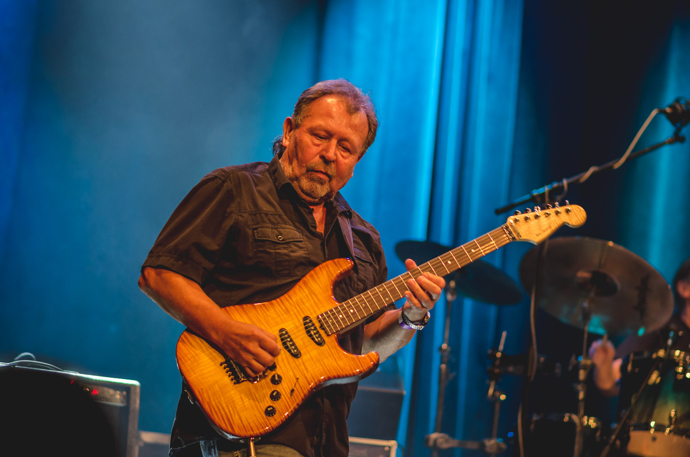 Koncert se skupinou Flamengo a Vladimírem Mišíkem 19.10.2015 v pražském Paláci Akropolis